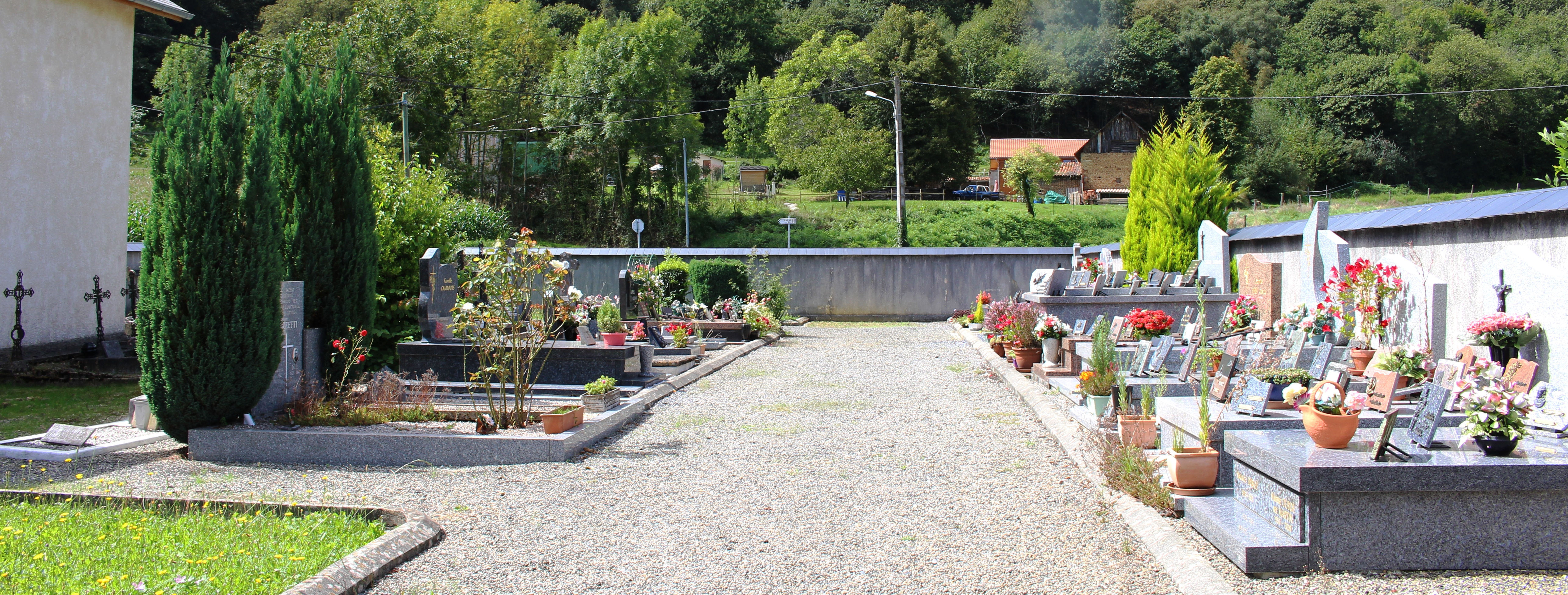 Cimetière de Péré (Hautes-Pyrénées)